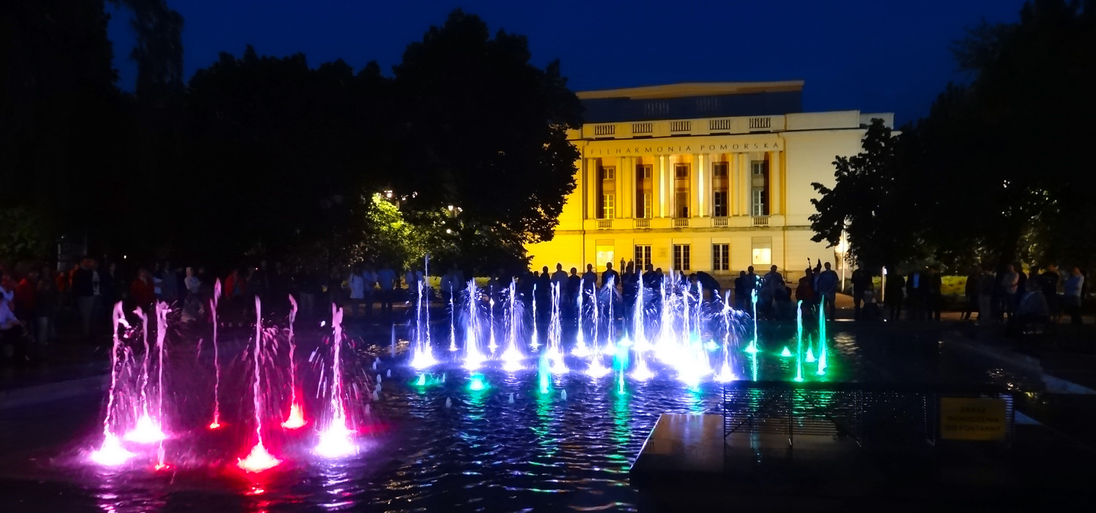 Fontanna przed budynkiem Filharmonii Pomorskiej im. Ignacego Jana Paderewskiego w Bydgoszczy, przebudowana w 2014 r., Dysponuje podświetlanymi dyszami wodnymi sterowanymi elektronicznie np. w rytm muzyki